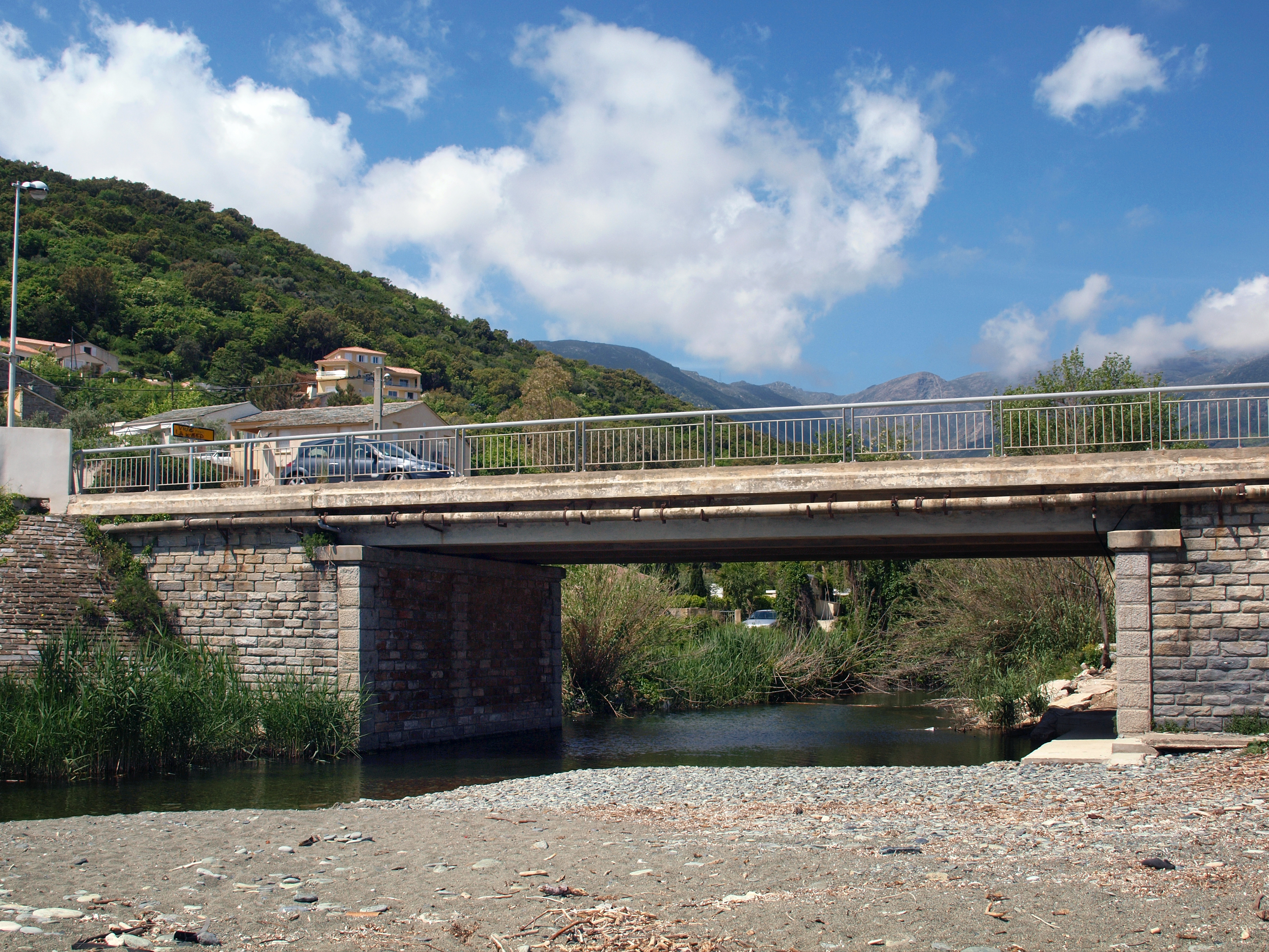 Santa-Maria-di-Lota, Cap Corse (Haute-Corse) - Pont de la route D80 sur le fiume de Poggiolo au-dessus de la plage de Miomo